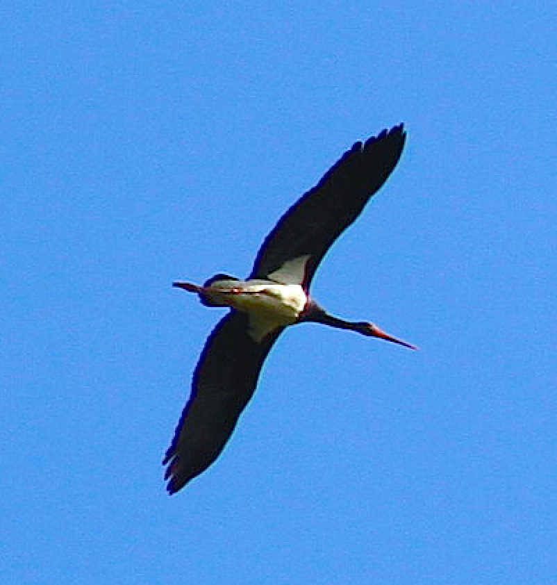 Rückers (Flieden) - Schwarzstorch in der Gemarkung Rückers im Naturpark Rhön